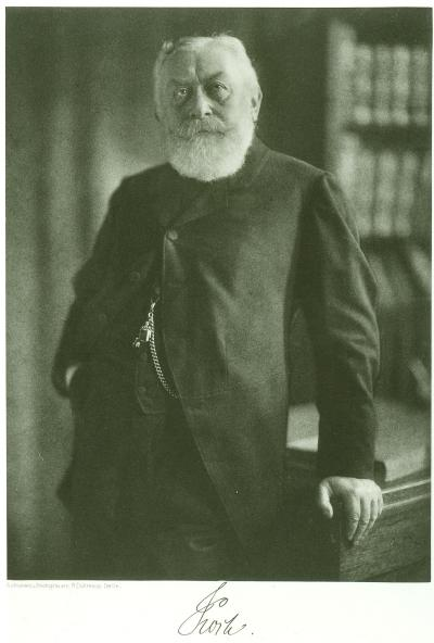 Hugo Koch war Professor für Baukonstruktionslehre an der Königlichen Technischen Hochschule in Charlottenburg (Berlin)